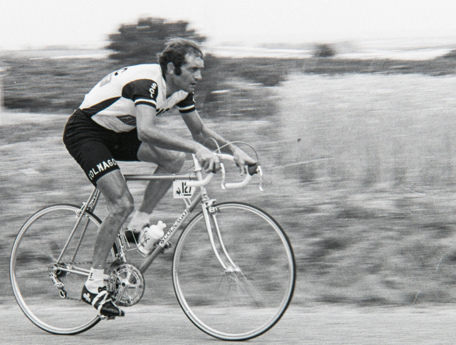 Enrico Paolini durant le Tour de France 1976. Photographie : René Milanese